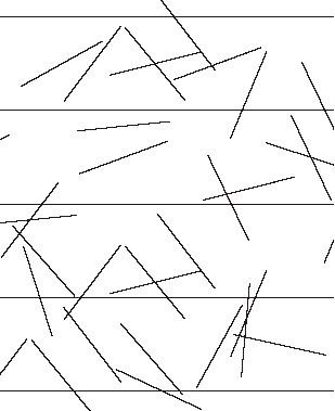 Пределение числа Пи стохастическми методом (методом Буффона)